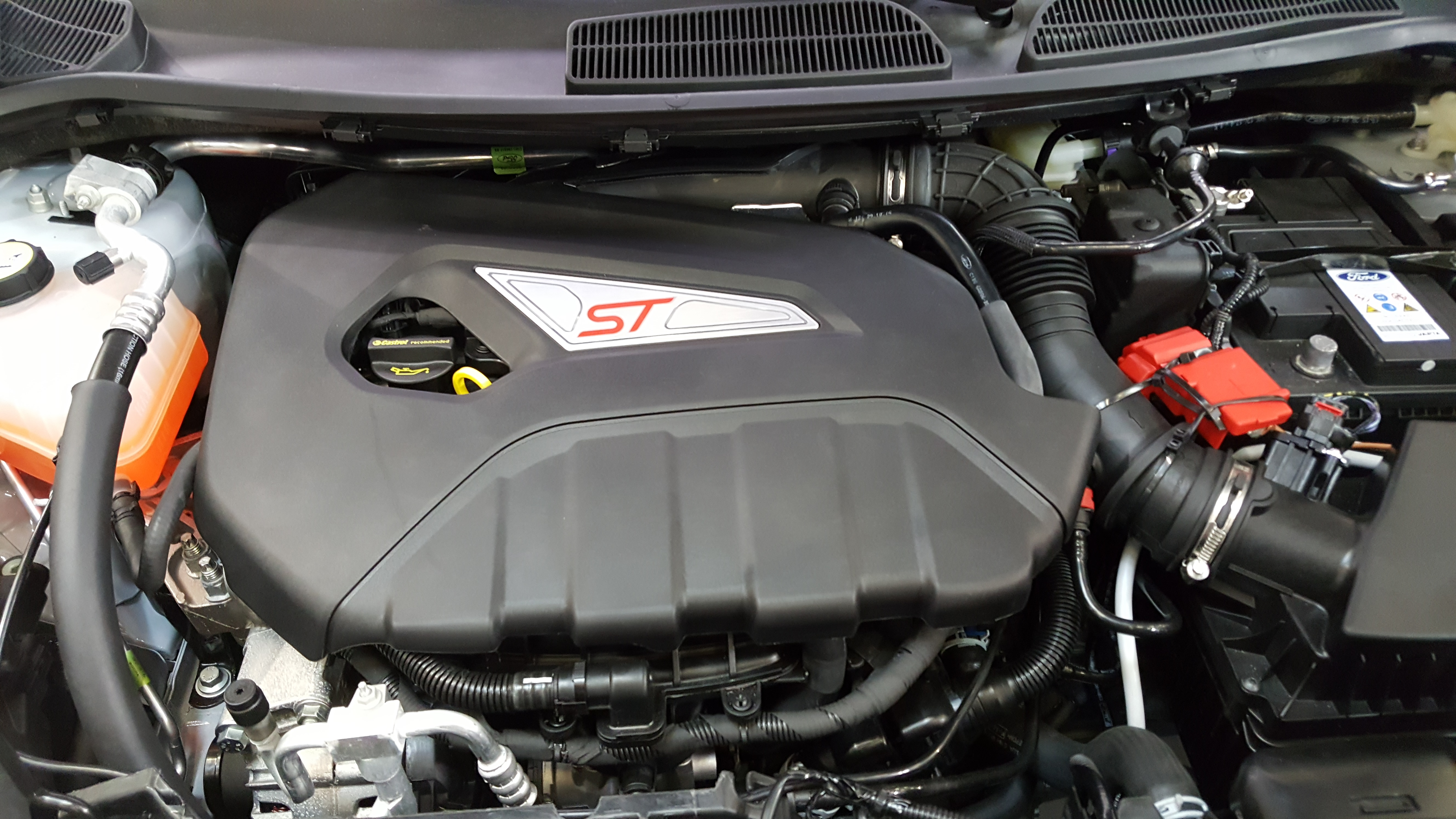 Motore Ford Fiesta ST200